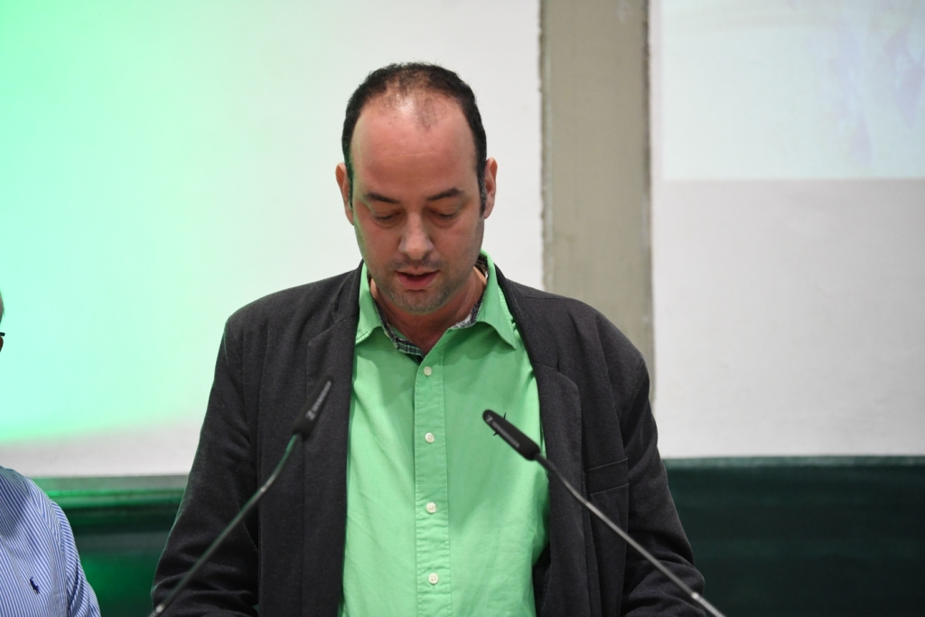 רועי שווץ בטקס חלוקת מלגות על שם נחום חת 2017